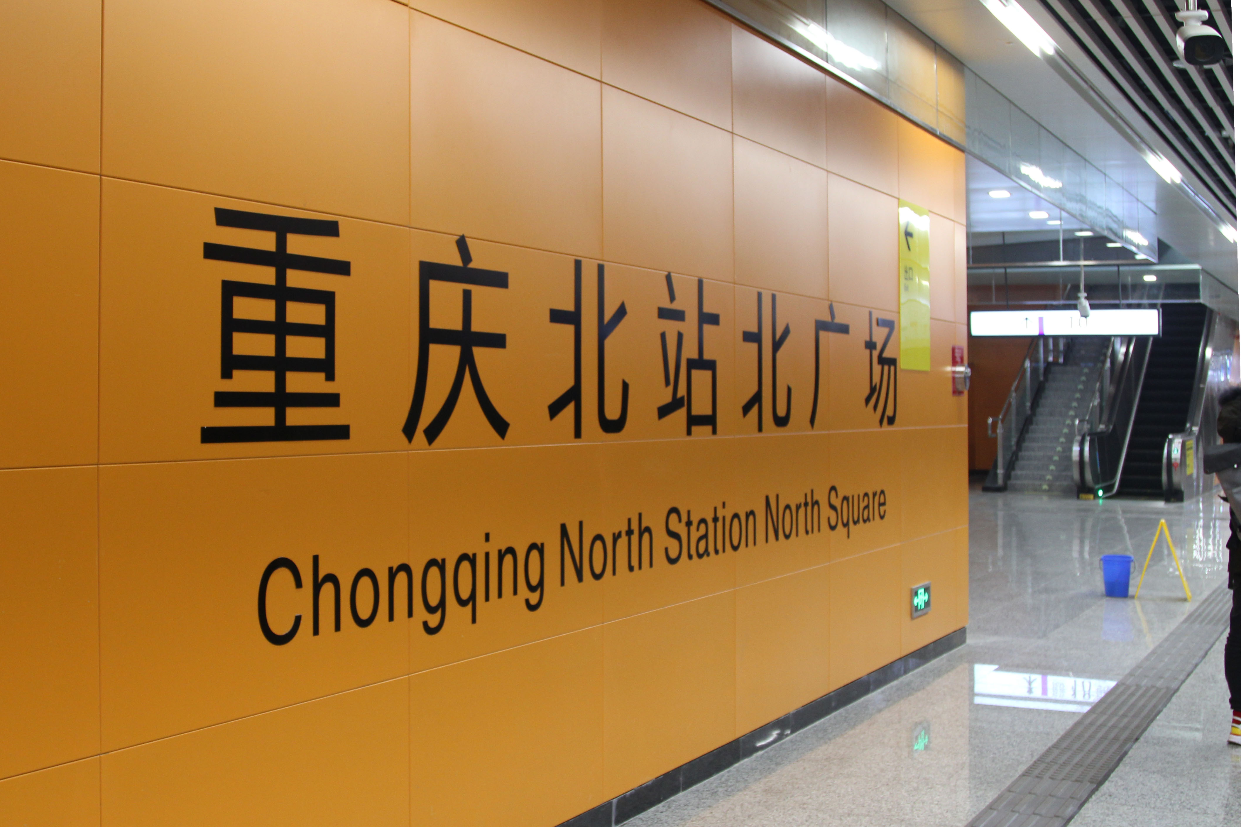 中文（中国大陆）: 4号线重庆北站北广场站